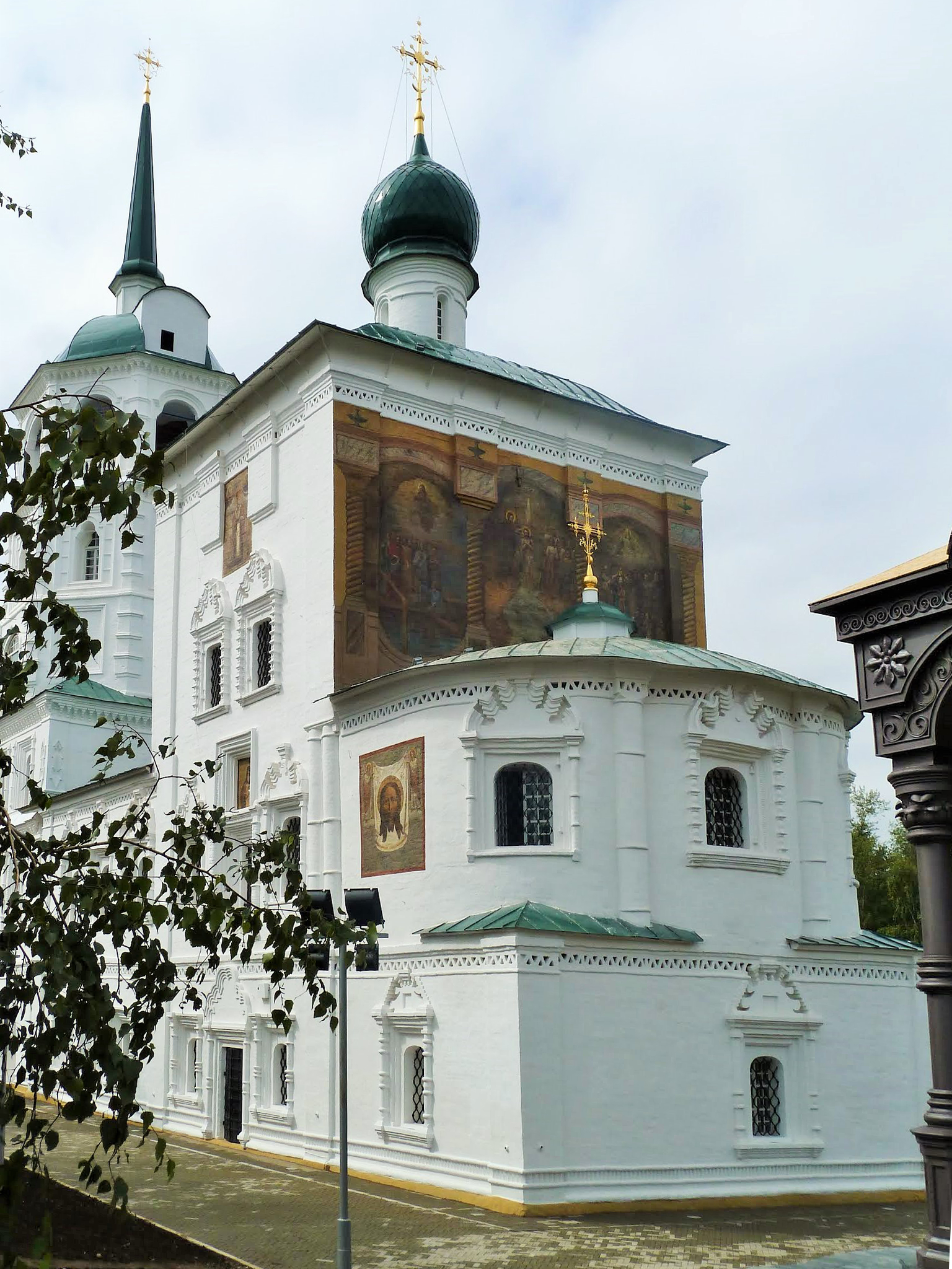 Église de Notre Sauveur (également la cathédrale du Christ-Sauveur , le Christ Sauveur Eglise Nerukotvornoko ou église Sauveur ) - église orthodoxe à Irkoutsk, situé sur le territoire de la Irkoutsk Kremlin perdu dans le centre historique de la ville. L'un des premiers bâtiments en pierre à Irkoutsk; monument rare art monumental.